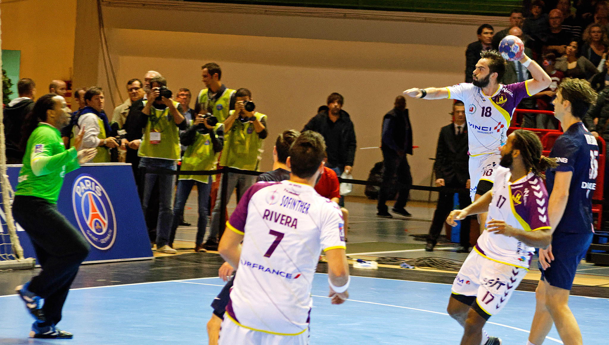 Match de la 6e journée de LNH entre le PSG handball et le HBC Nantes. A Coubertin, le 22 octobre 2014.